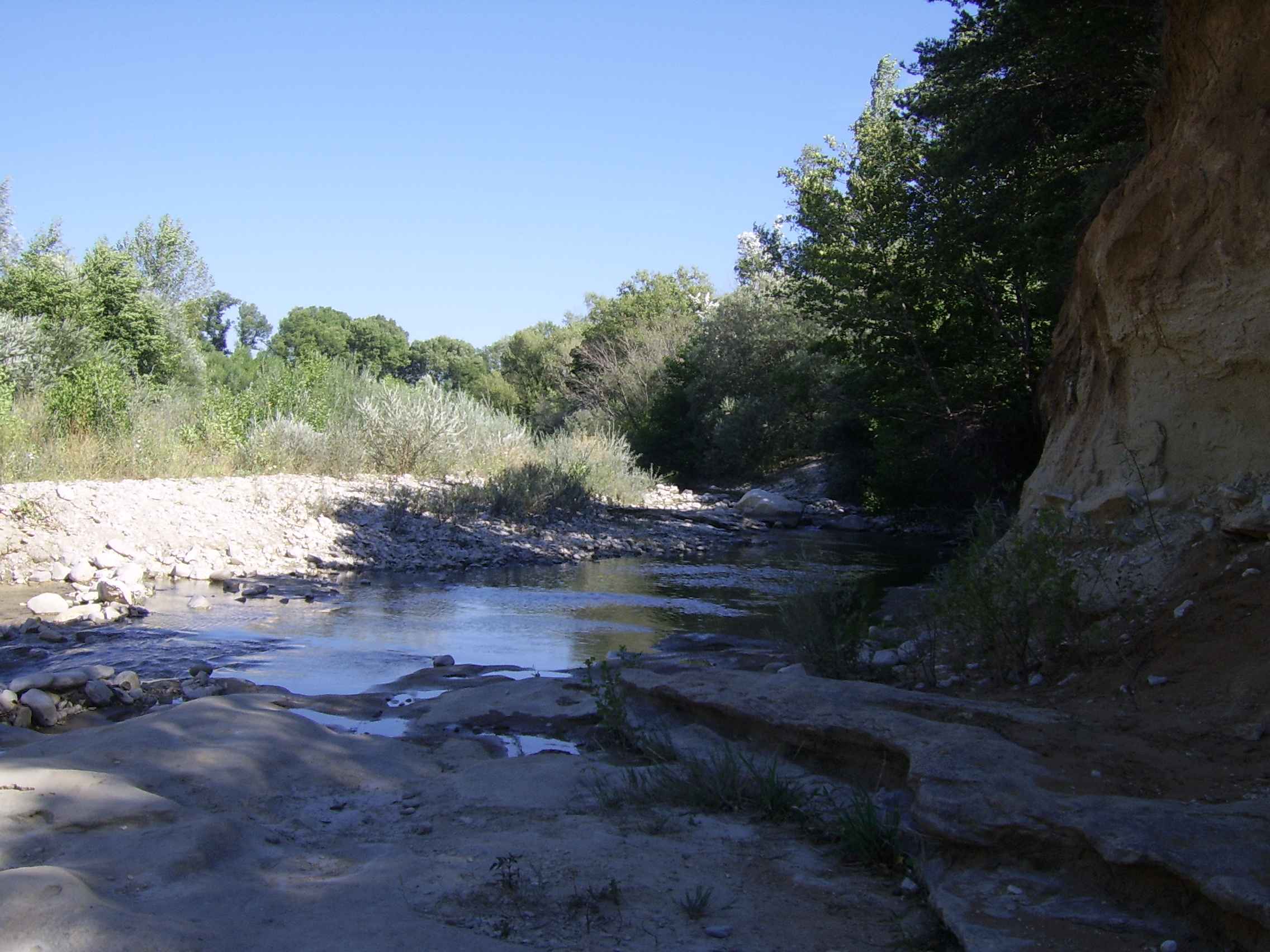 Le Lez, près de Taulignan (26)